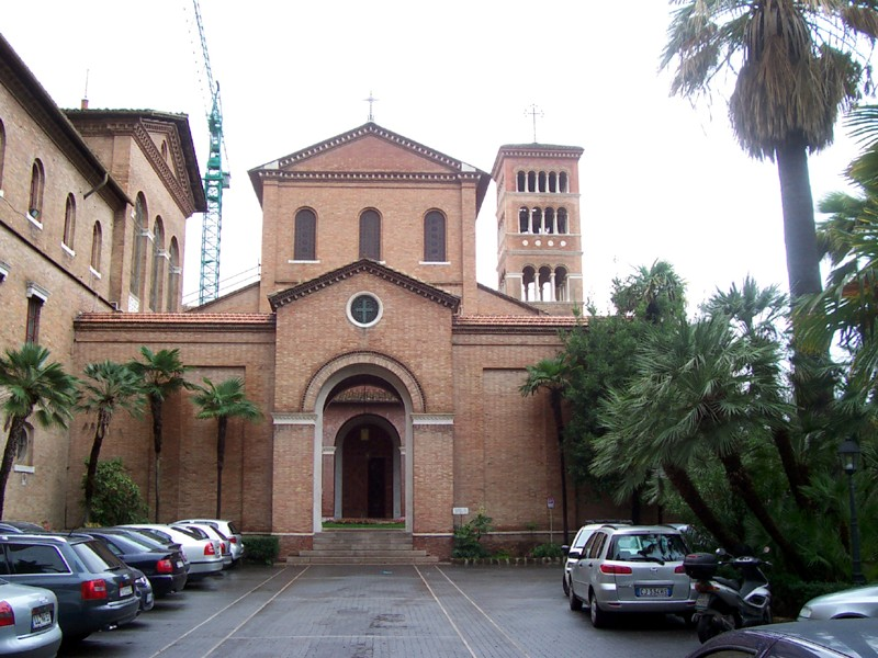 Roma - Chiesa di S. Anselmo all'Aventino